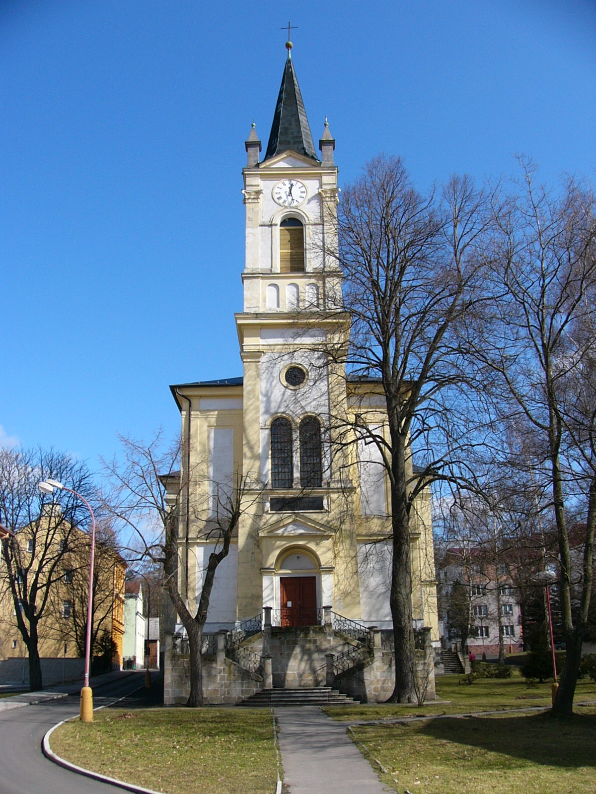 Kirche von Asch